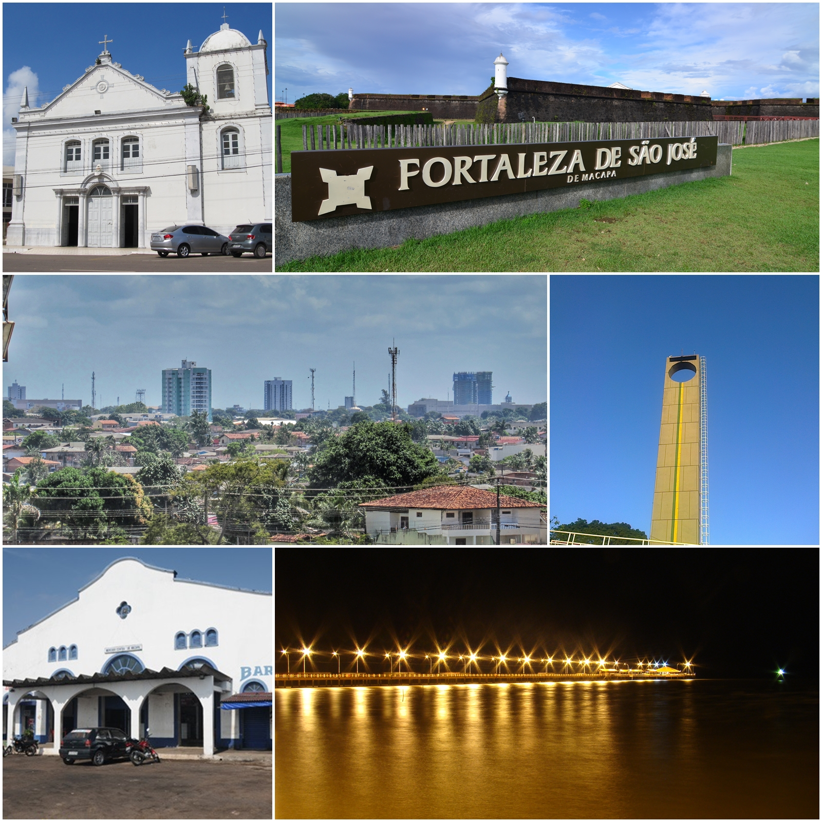 Montagem de Macapá.